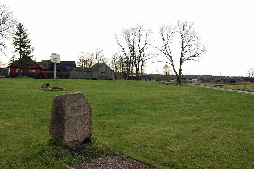 Päite külaplats